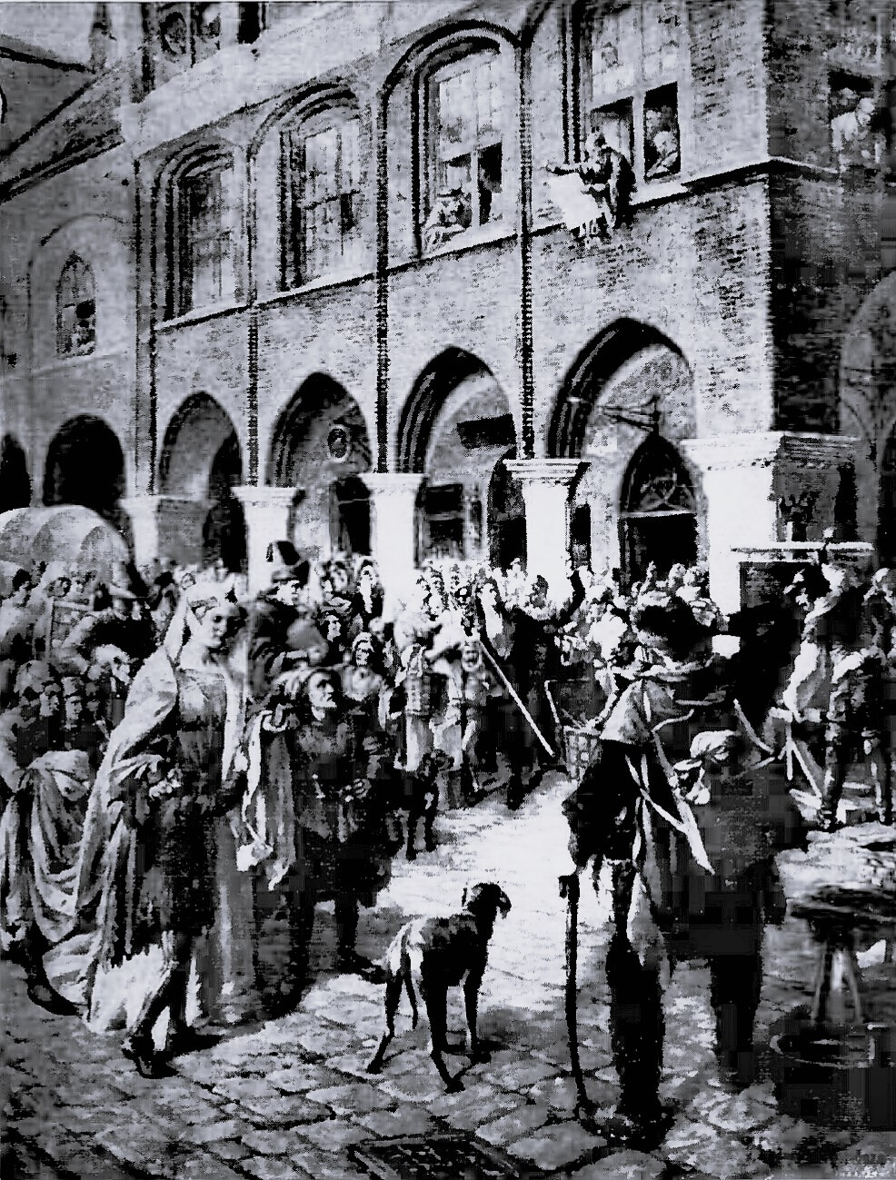 Ein Vorgang am dem Lübecker Marktplatz der Hansezeit in monumentaler Form und zugleich historischer Treue geschildert.